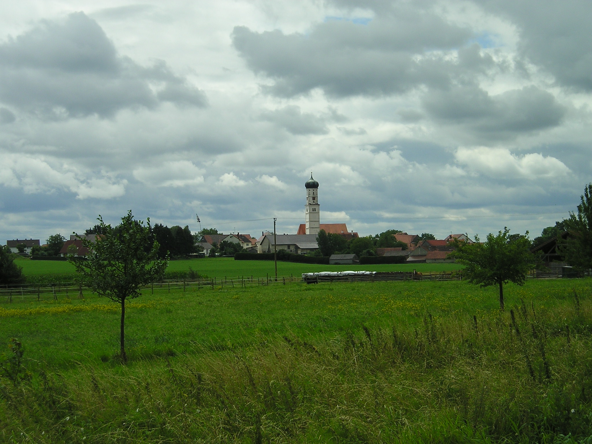 Mauern, Gemeindeteil von Rennertshofen, Landkreis Neuburg-Schrobenhausen.